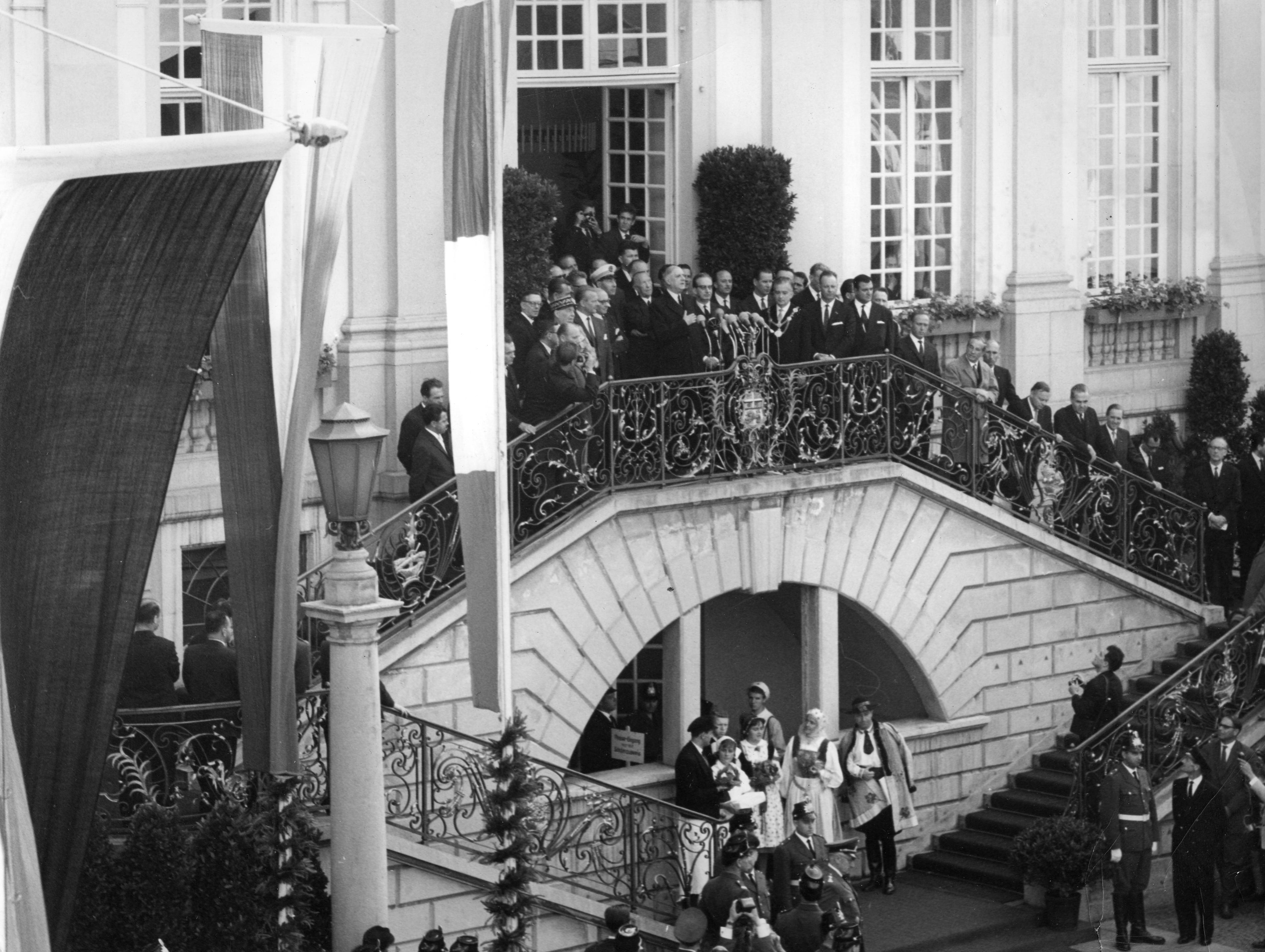 Bonn, 4.-5.9.1962 Bundeskanzler Dr. Konrad Adenauer mit dem französischen Staatspräsidenten Charles de Gaulle